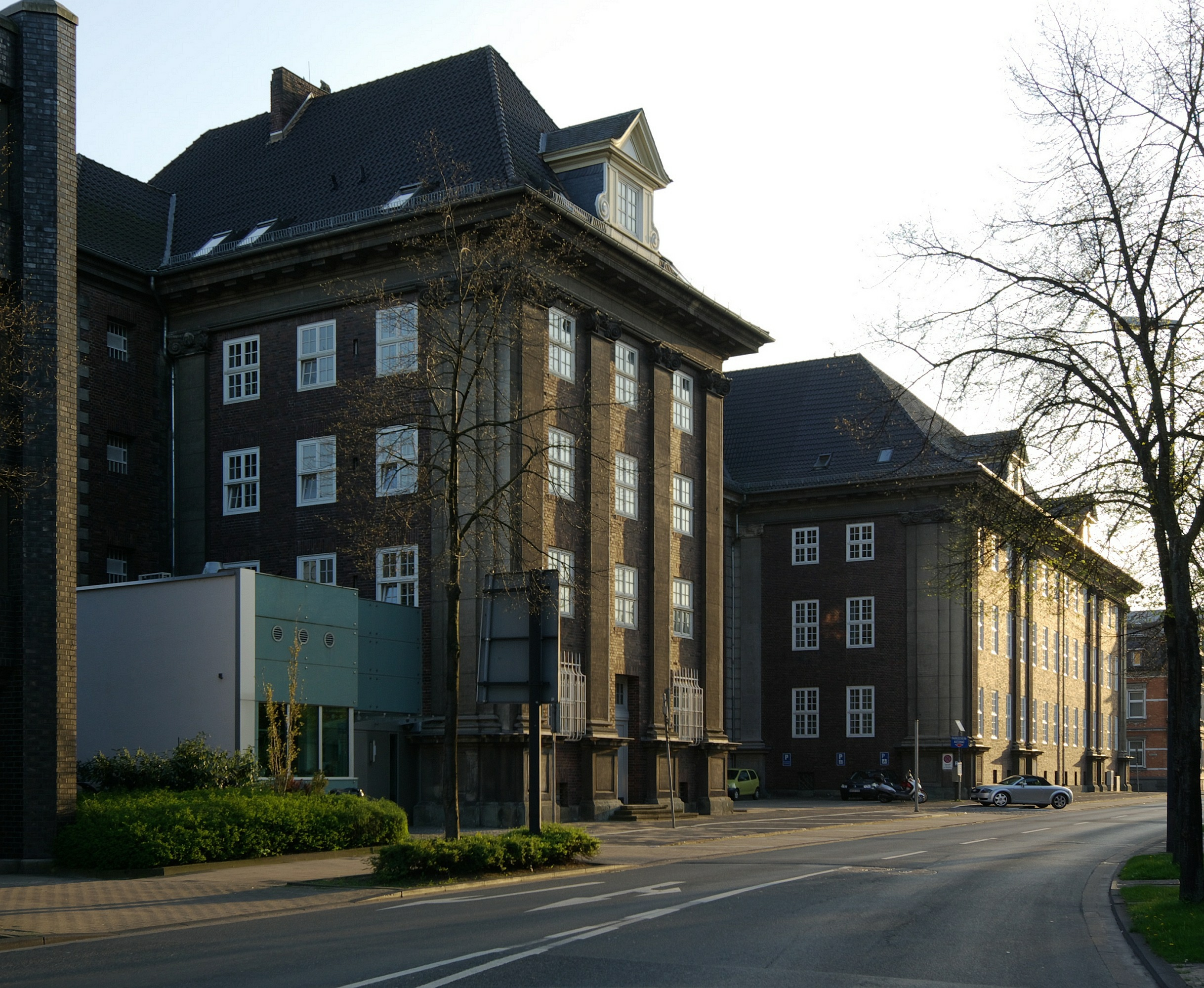 Hamm, Nordrhein-Westfalen